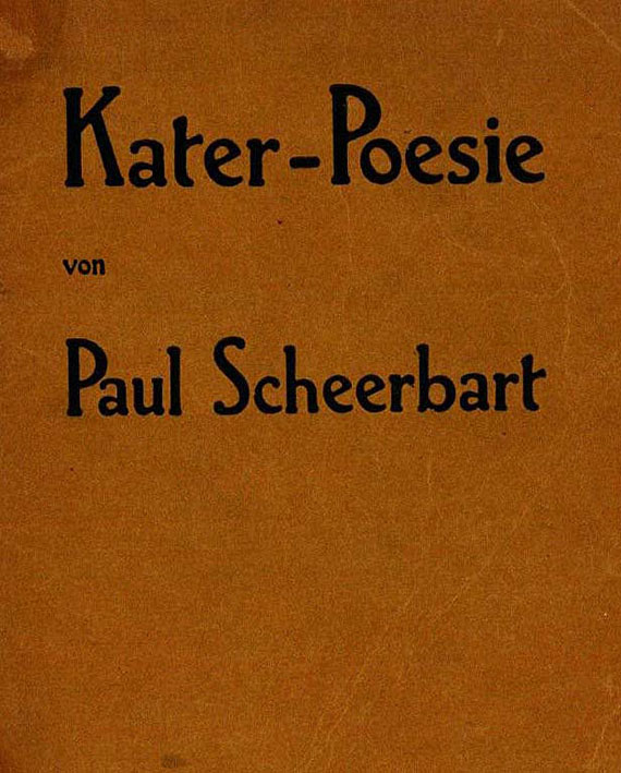 Umschlag der Erstausgabe von Paul Scheerbarts "Katerpoesie""